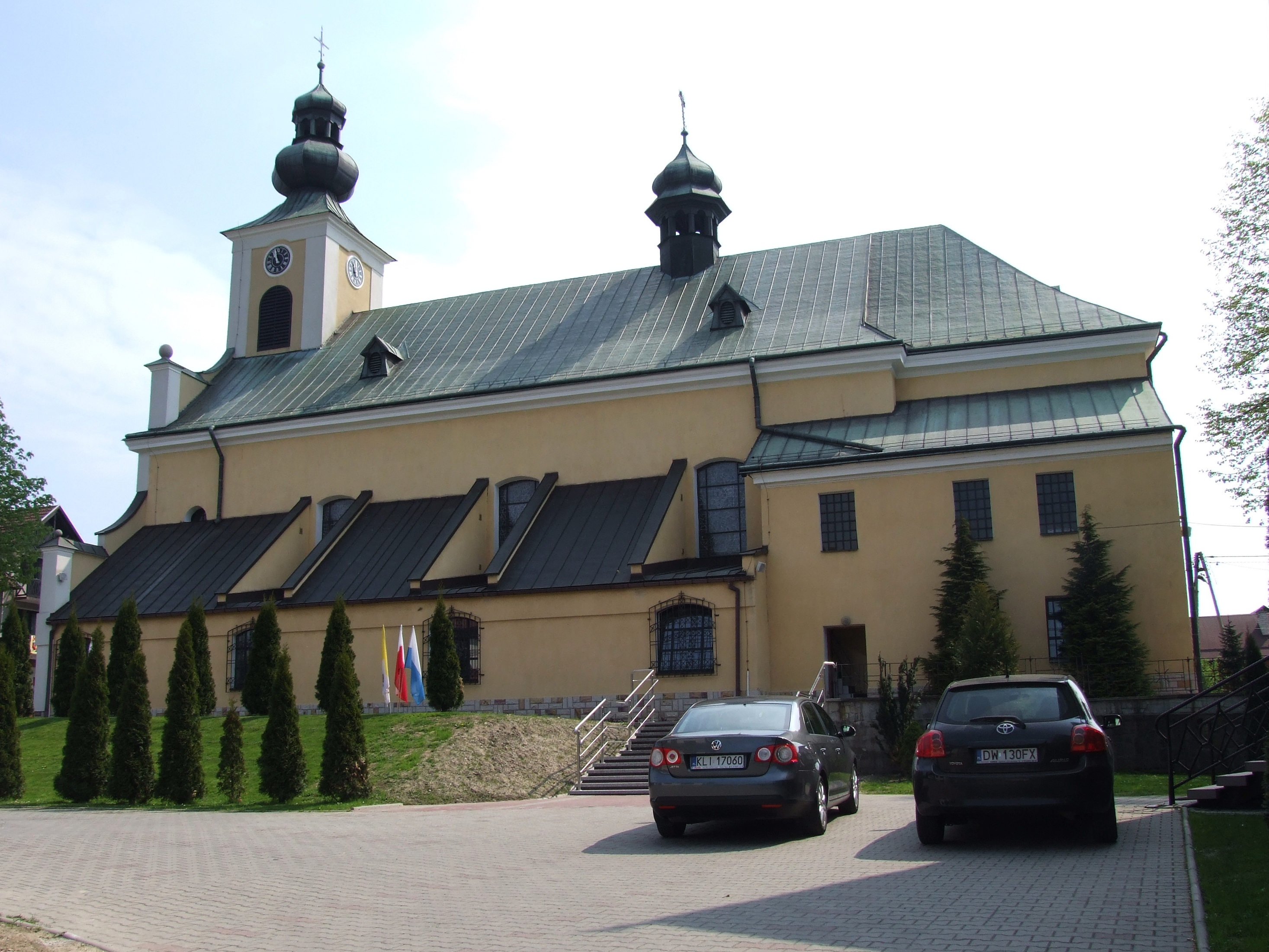 Kościół w Tymbarku